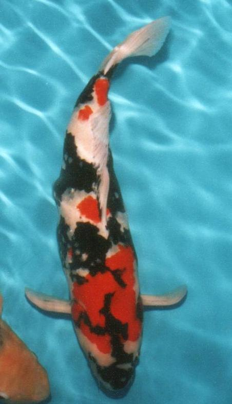 Showa